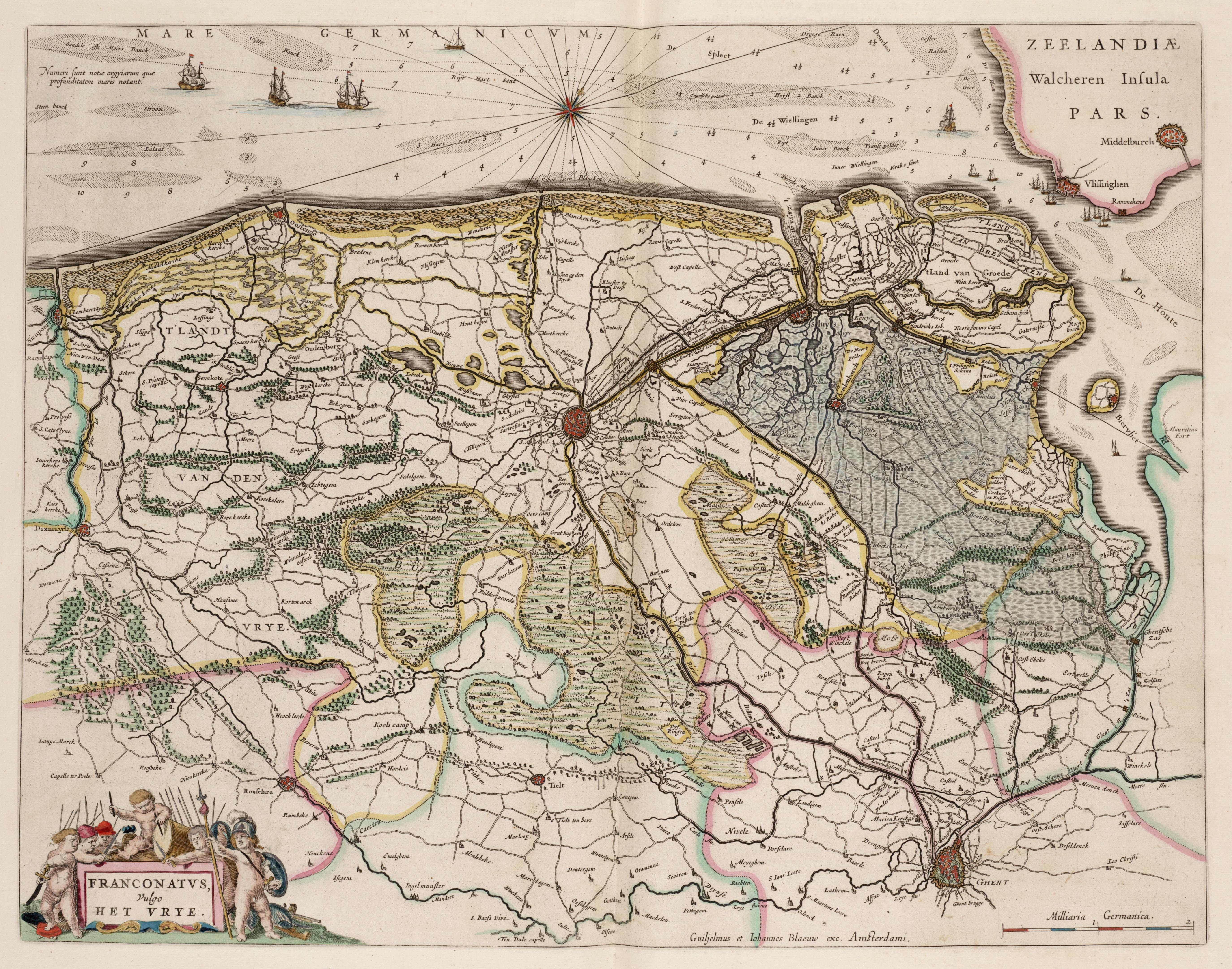 Kaart van het Brugse Vrije, 1664, door Willem Janszoon Blaeu.